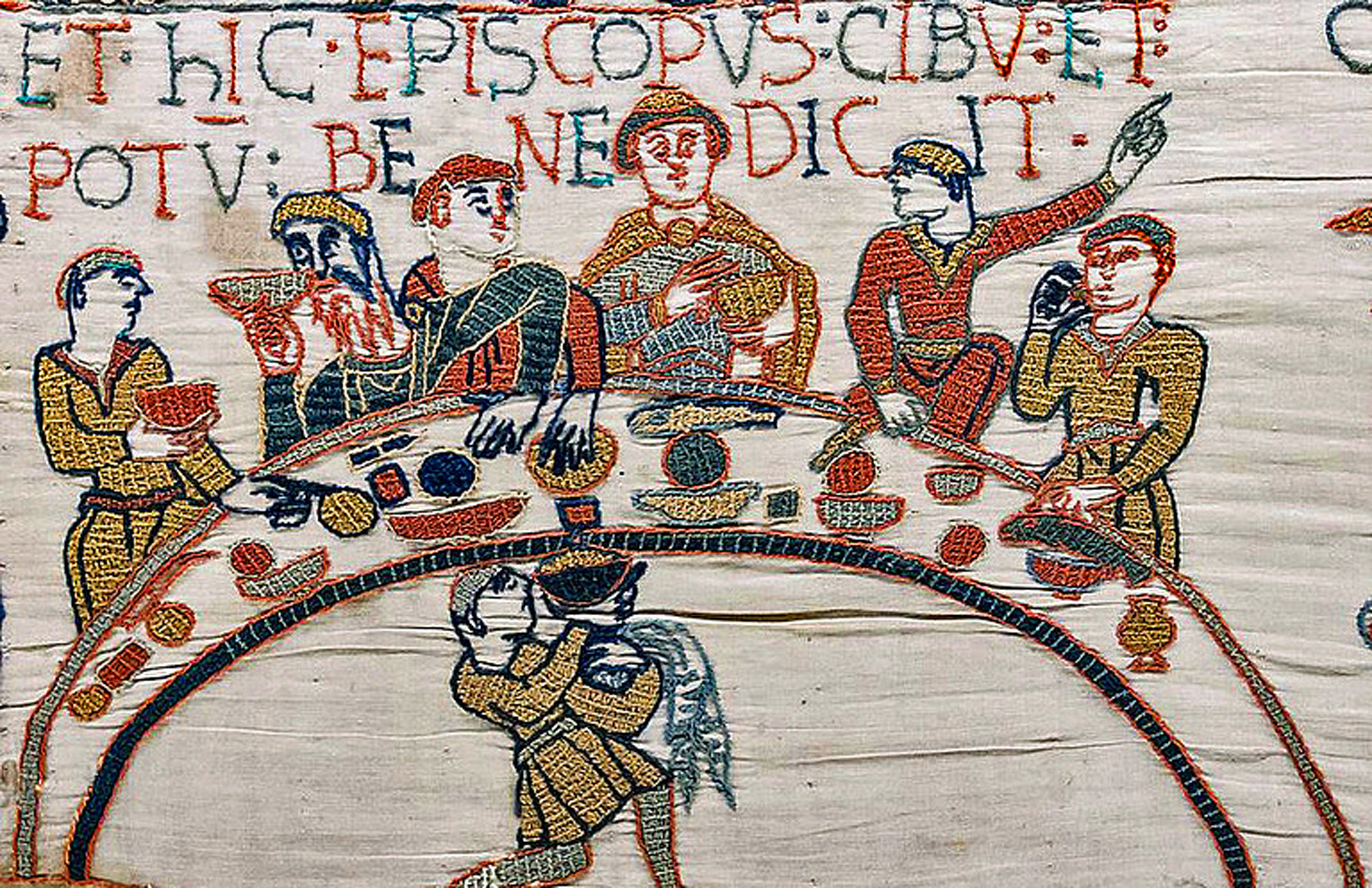 Banquet de Guillaume le conquérant avant la bataille d'Hastings (Tapisserie de Bayeux, fin XIe siècle)